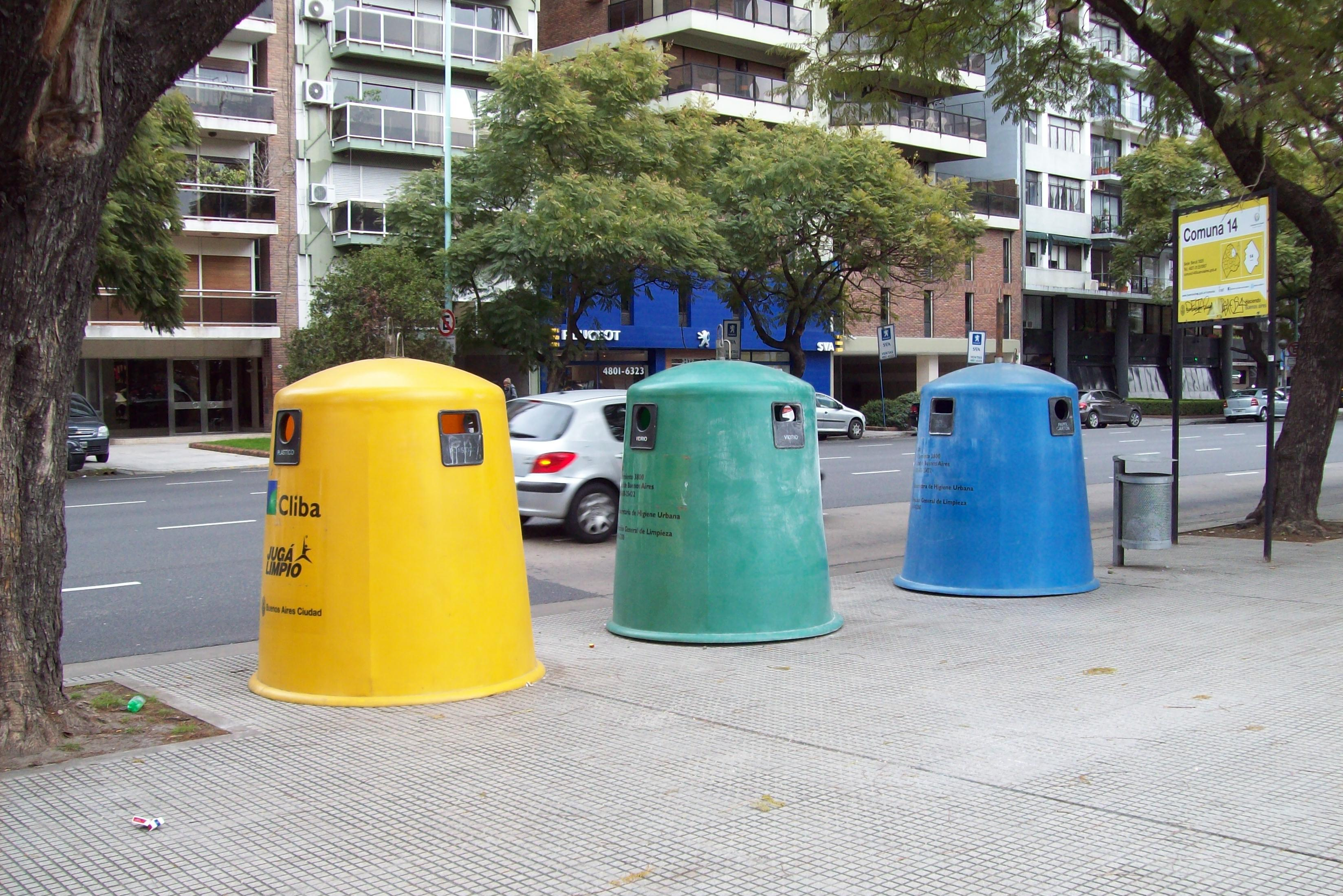 Contenedores de residuos en Buenos Aires. Amarillo: plástico, Verde vidrio: Azul papel/cartón.